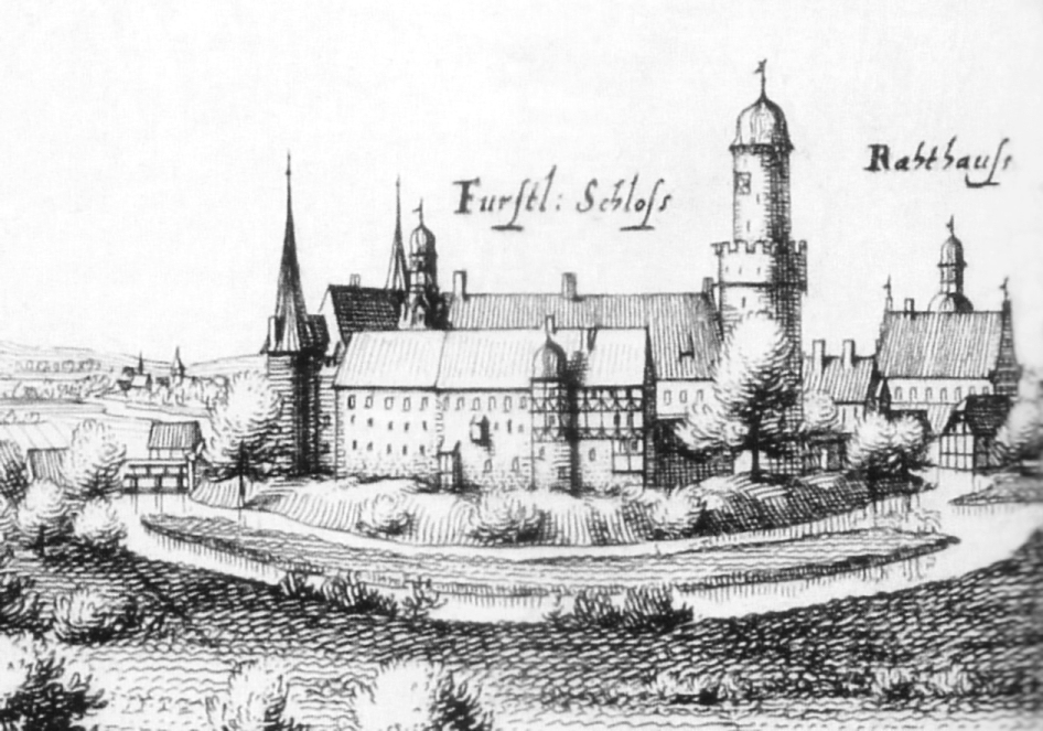 Schloss Lüchow mit dem runden Amtsturm, Ansicht von Süden, recht das Rathaus